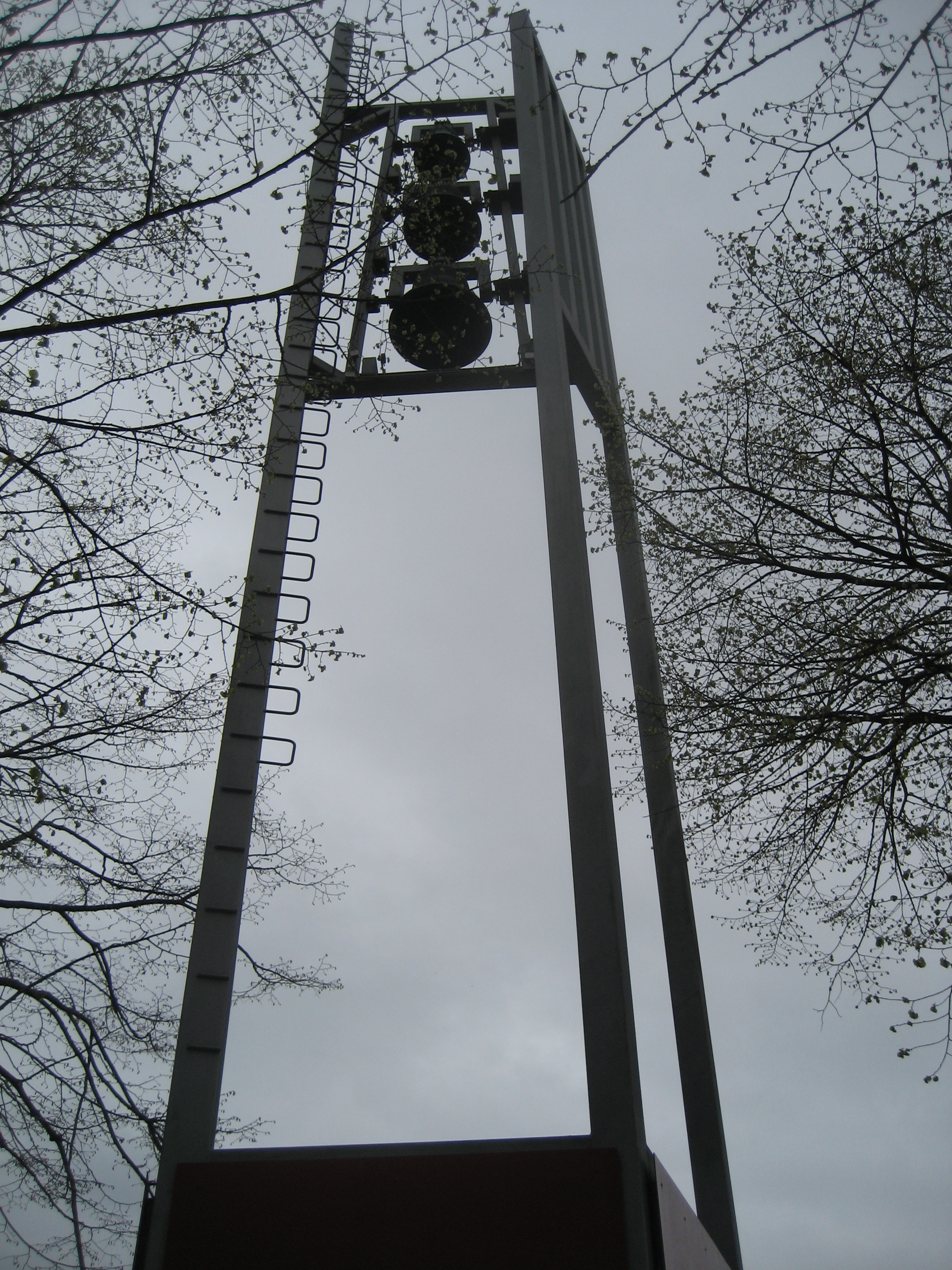 Klokketoren Sint-Josephkerk, Wateringen